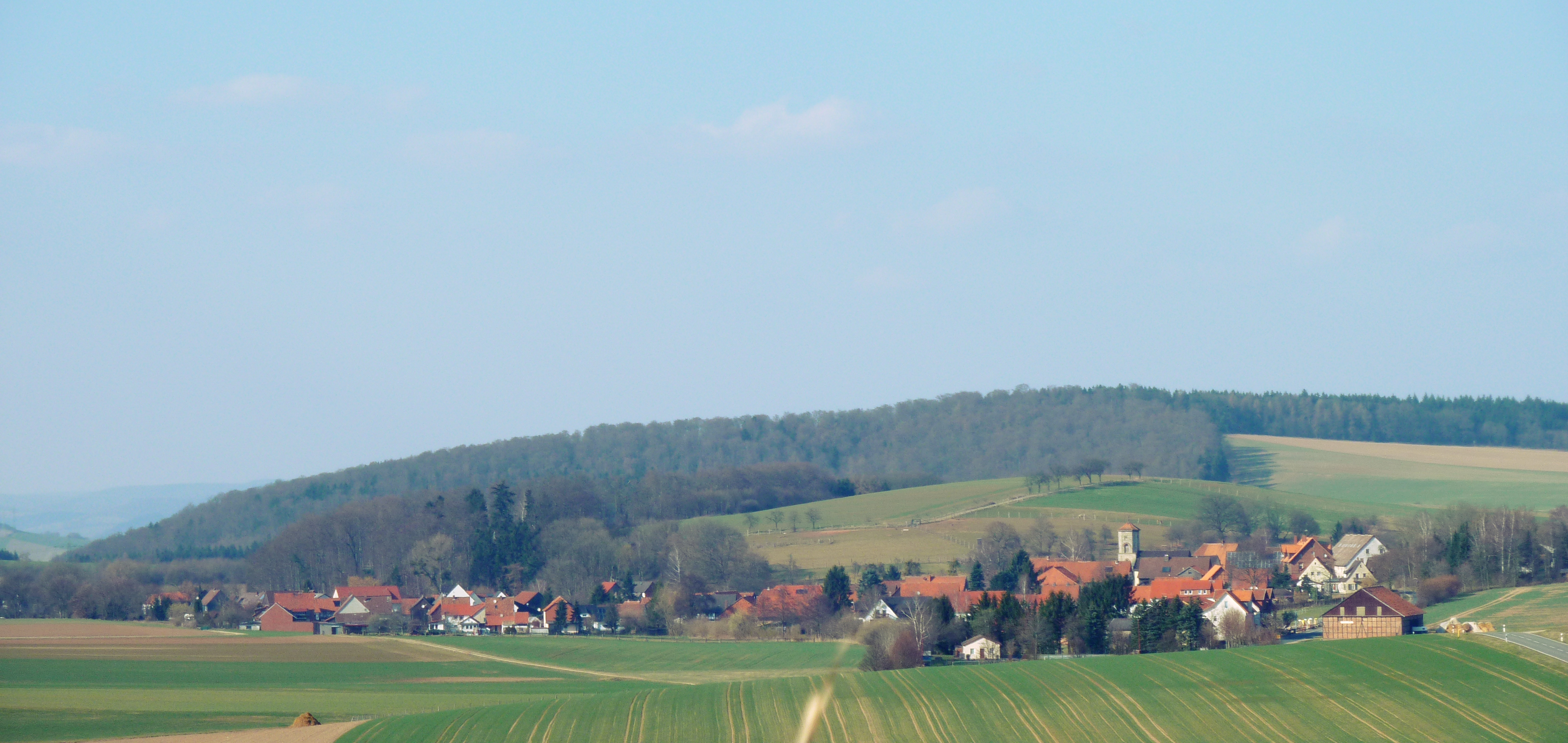 Blick von Süden auf Ahlshausen, Gemeinde Kreiensen, Landkreis Northeim